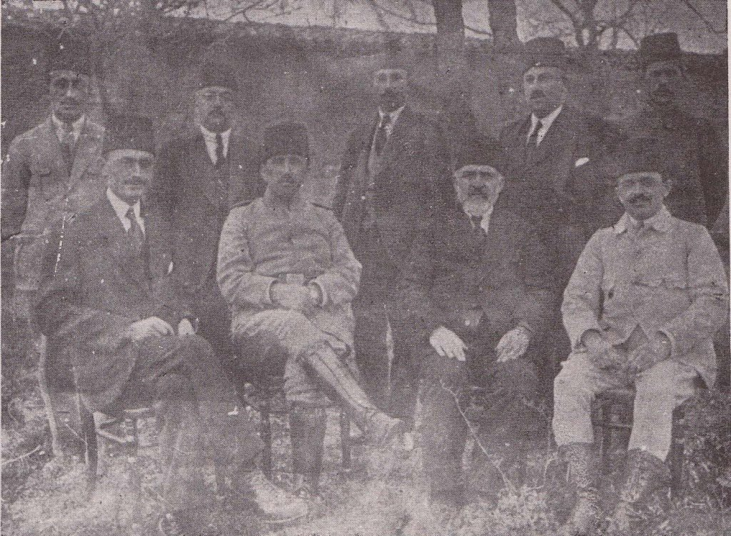 Trakya-Paşaeli Müdafaa-i Hukuk Cemiyeti Kongresi İdare heyeti, 31 Mart 1920, Cem Altınel koleksiyonu